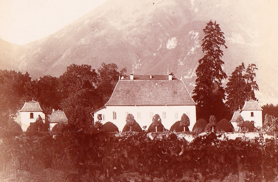 Détail d'une photo de 1898 du Château de la Cour, Annecy-le-Vieux, Haute-Savoie, France